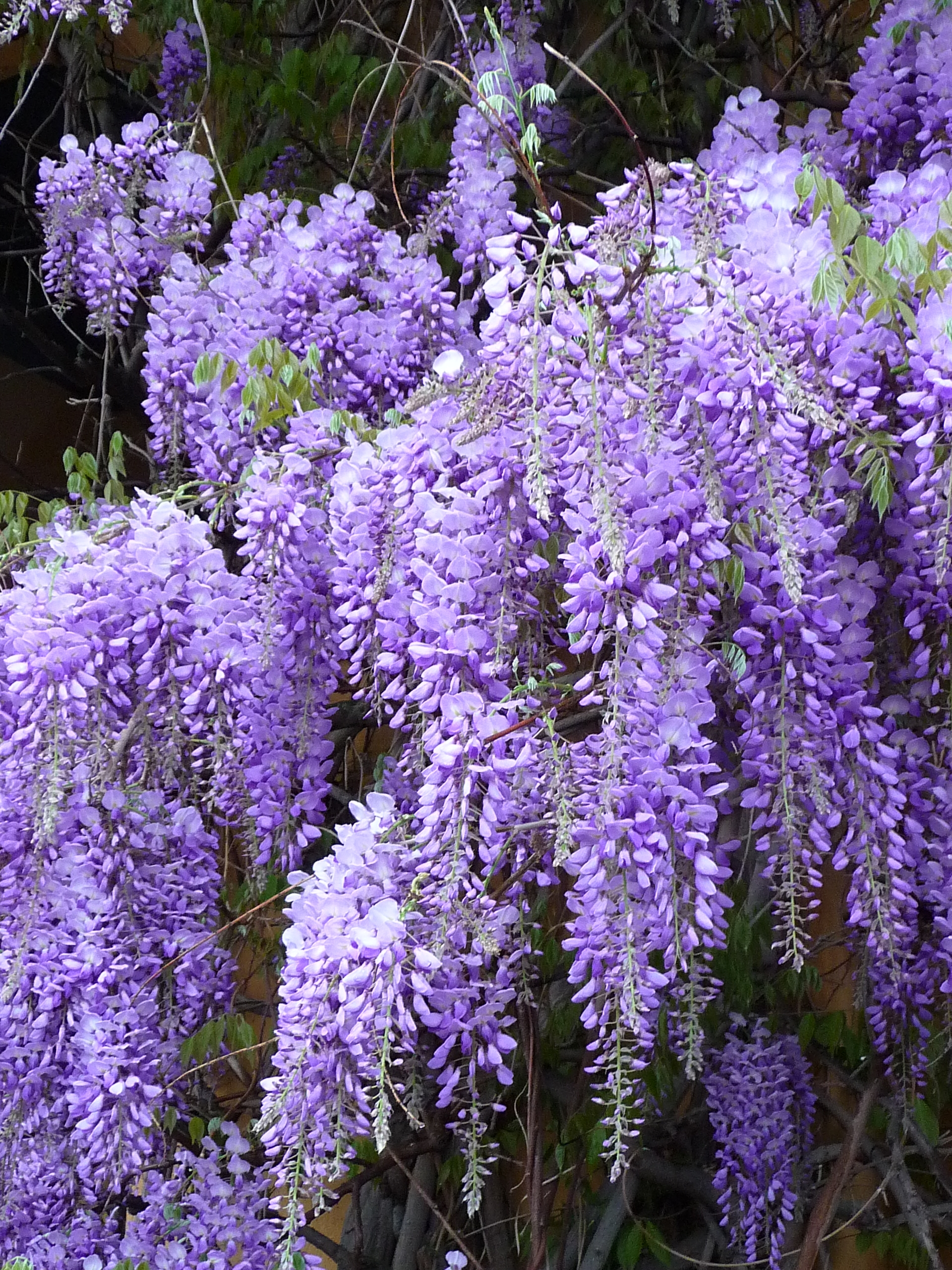 Chinesische Wisteria (Wisteria sinensis) / auch Chinesischer Blauregen genannt